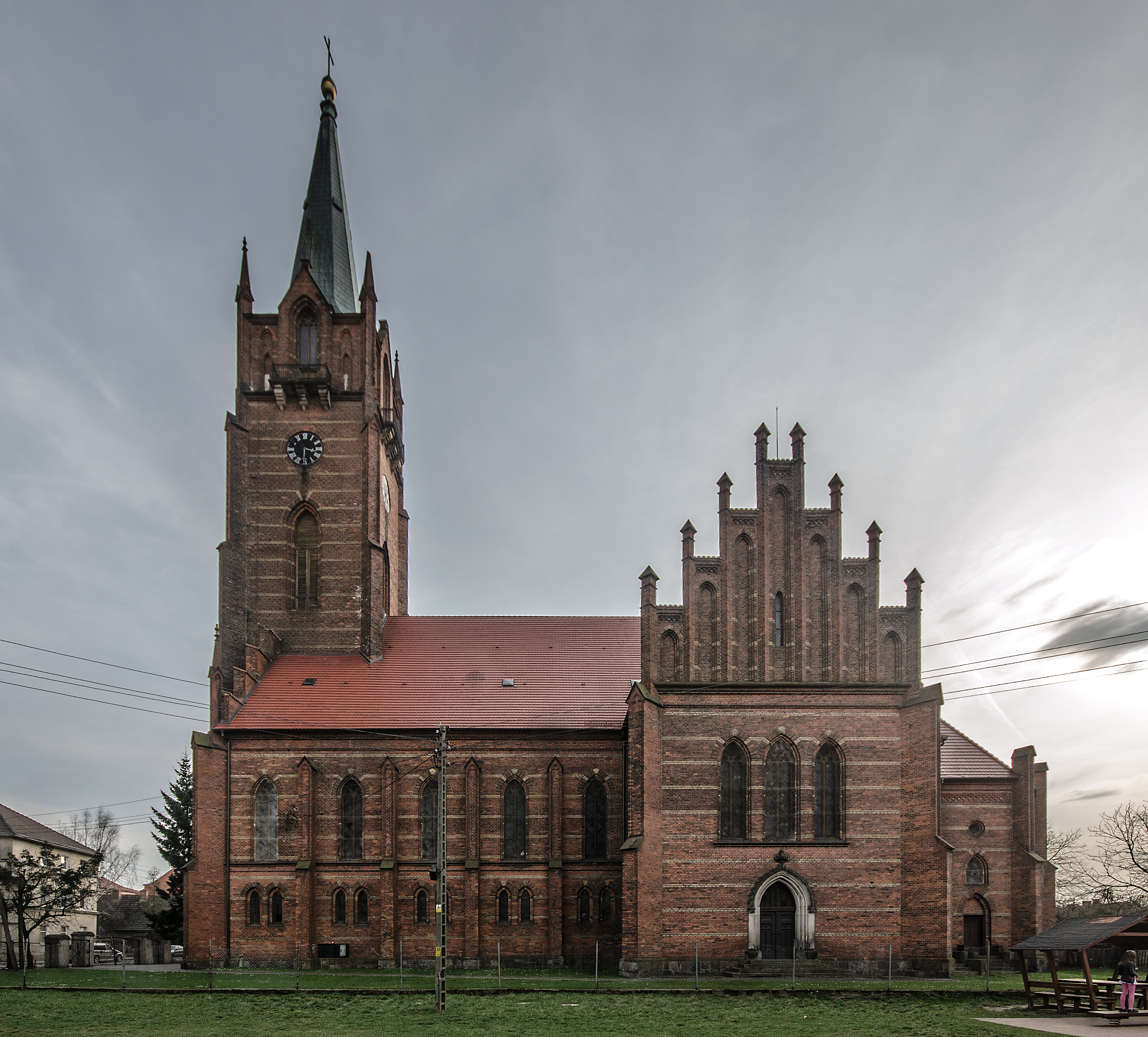 Żmigród, kościół ewangelicki, ob. rzym.-kat. fil. p.w. św. Stanisława Kostki, 1854-1861